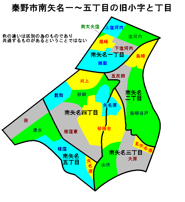 秦野市南矢名一～五丁目の旧小字地図